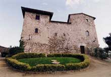 Foto del Castillo de Plegamans, en la población de Palau-solità i Plegamans.